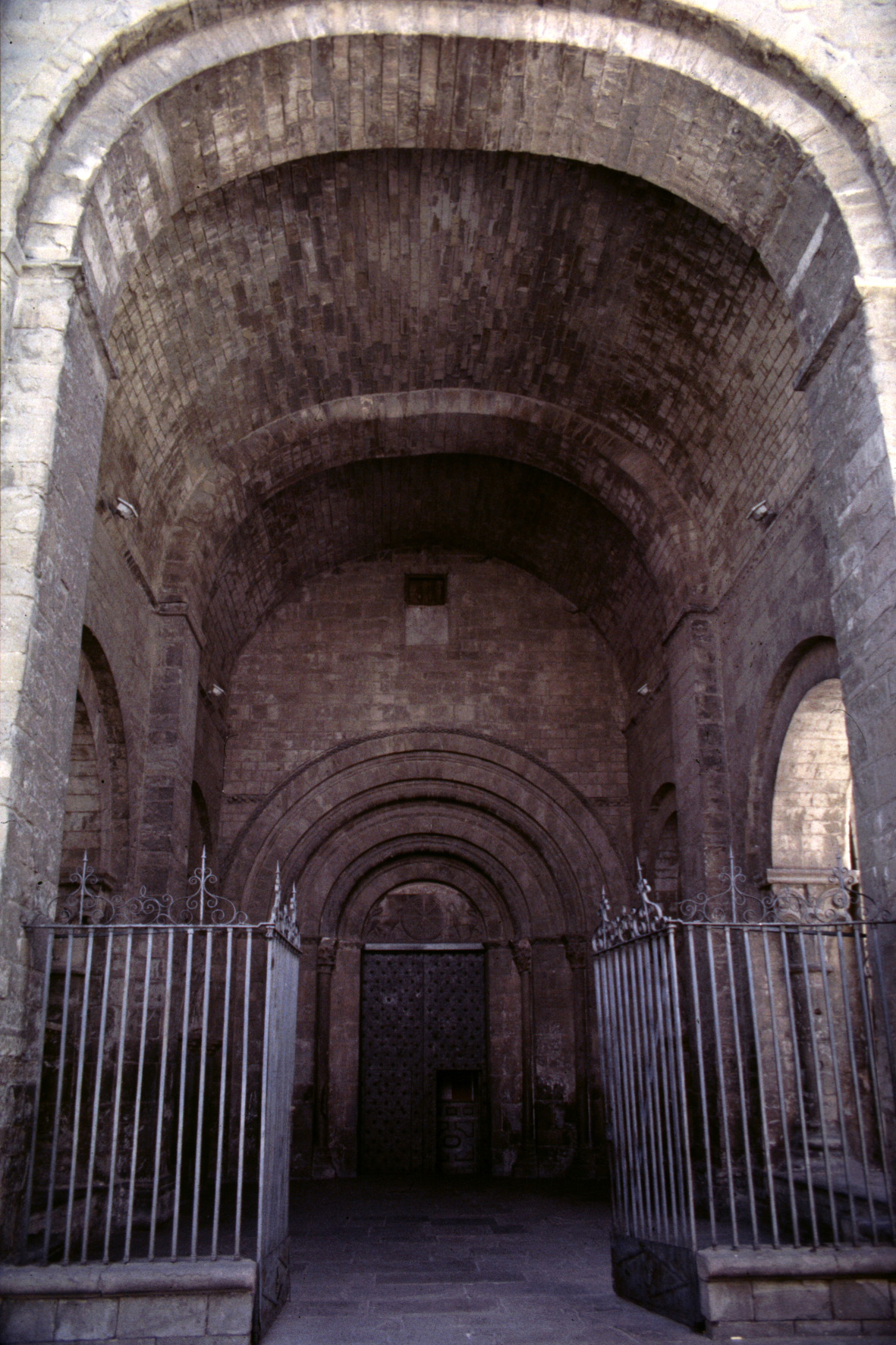 Jaca, Catedral de San Pedro